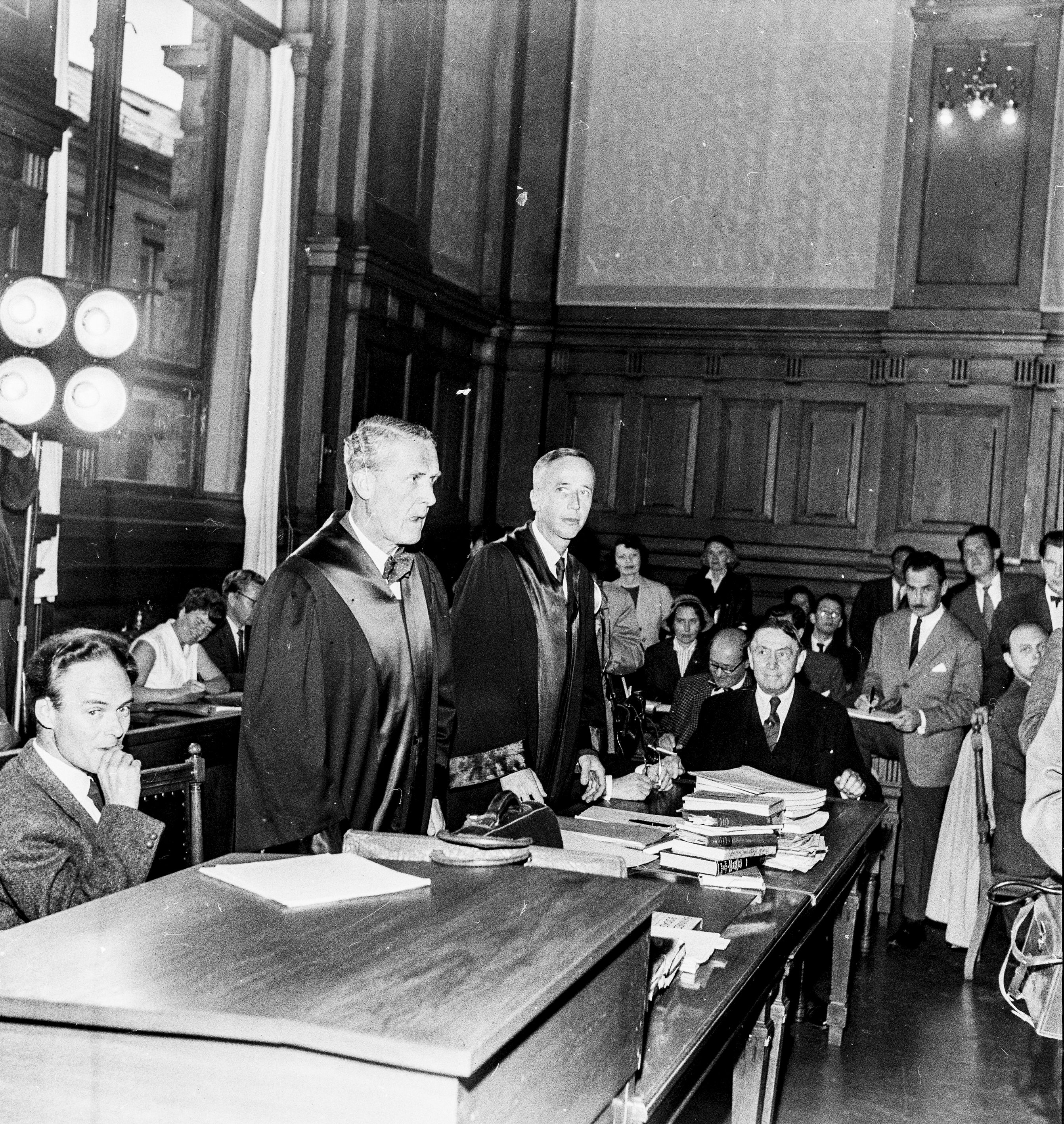 Foto overført fra Riksarkivets album «Rettsaken mot Agnar Mykle og Harald Grieg» på Flickr med følgende beskrivelse: Etter utgivelsen av Sangen om den røde rubin i 1956 ble Agnar Mykle og direktøren i Gyldendal, Harald Grieg, tiltalt etter straffelovens § 211 nr.1b, for utgivelse av utuktige skrifter. Det ble ført straffesak både mot dem og mot boka. Etter dom i Oslo byrett 10. oktober 1957 ble de tiltalte frikjent på grunn av rettsvillfarelse. Boka ble derimot gjort ulovlig og restopplaget inndratt. Det ble slått fast at romanen var utuktig. Boka og satsen til boka skulle etter ordre fra Riksadvokaten øyeblikkelig beslaglegges hos forlaget og i alle landets bokhandler. Dommen ble anket og opphevet av Høyesterett 9. mai 1958. Disse bildene stammer fra Billedbladet NÅ sin dekning av saken. Behandling av ankesak i Høyesterett 9. mai 1958 i forbindelse med utgivelsen av Sangen om den røde rubin. Fotograf: Fjørtoft, Bjørn, Billedbladet NÅ, Riksarkivet (RA/PA-0797/U/Ue/L0064/0012)